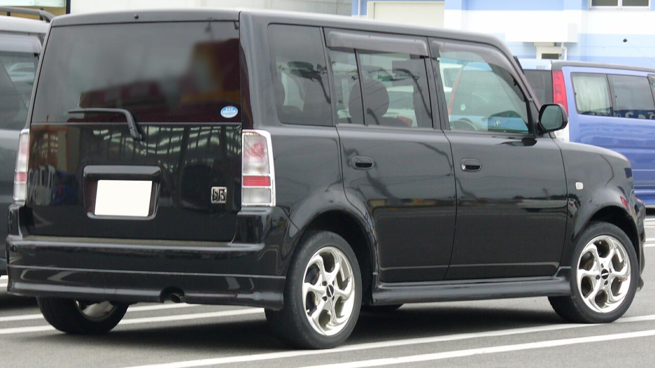 トヨタ・bB（初代：リア）